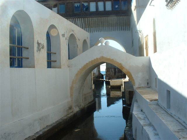 Complexe touristique à Staoueli sur la presqu'ile de Sidi FredjSidi Frej